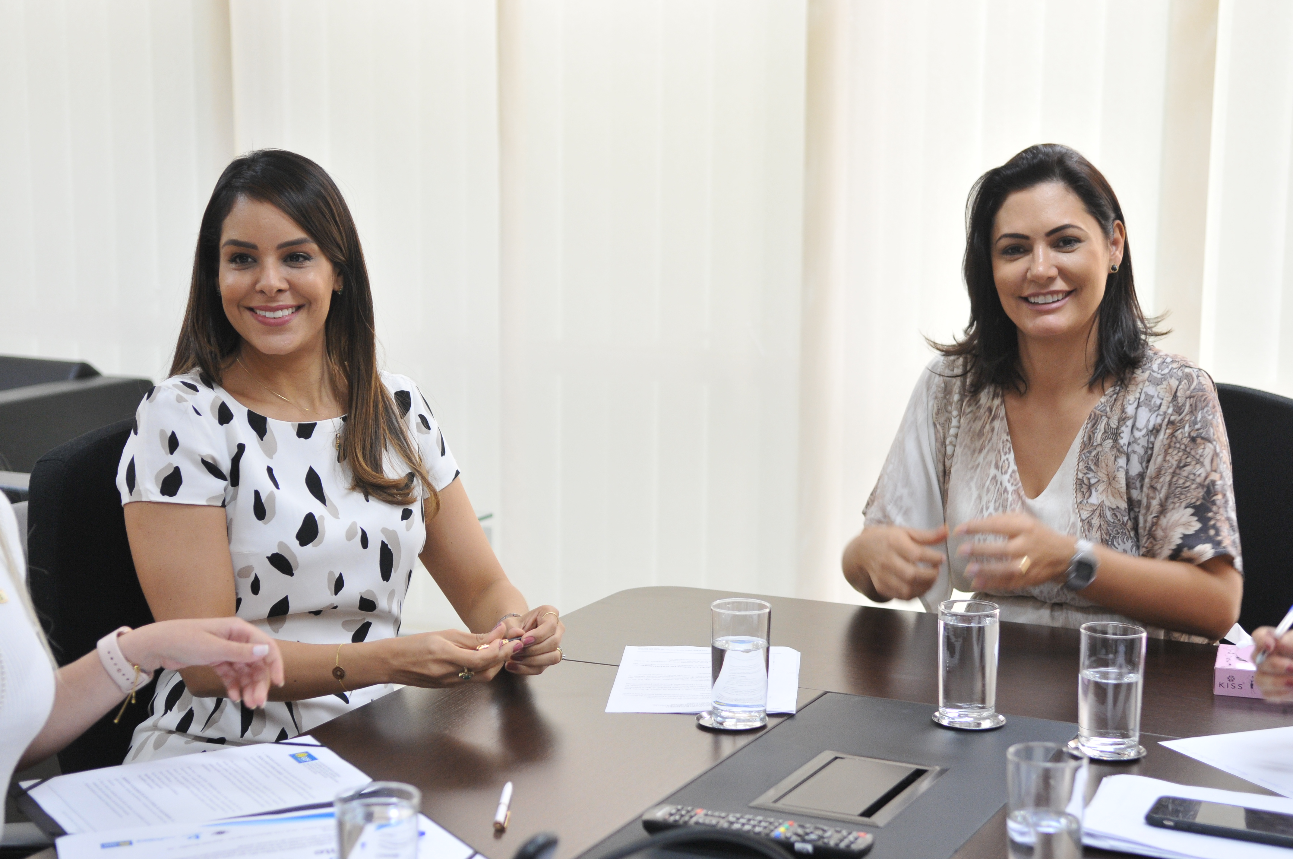 A primeira-dama do Distrito Federal, Mayara Noronha, encontrou-se na tarde desta terça-feira (20) com Michelle Bolsonaro, esposa do presidente da República. Essa foi a primeira vez em que as duas tiveram oportunidade de conversar a sós, fora dos eventos oficiais. A reunião, de uma hora de duração, aconteceu no gabinete do Ministério da Cidadania e marcou a aproximação entre as representantes dos governos local e federal.